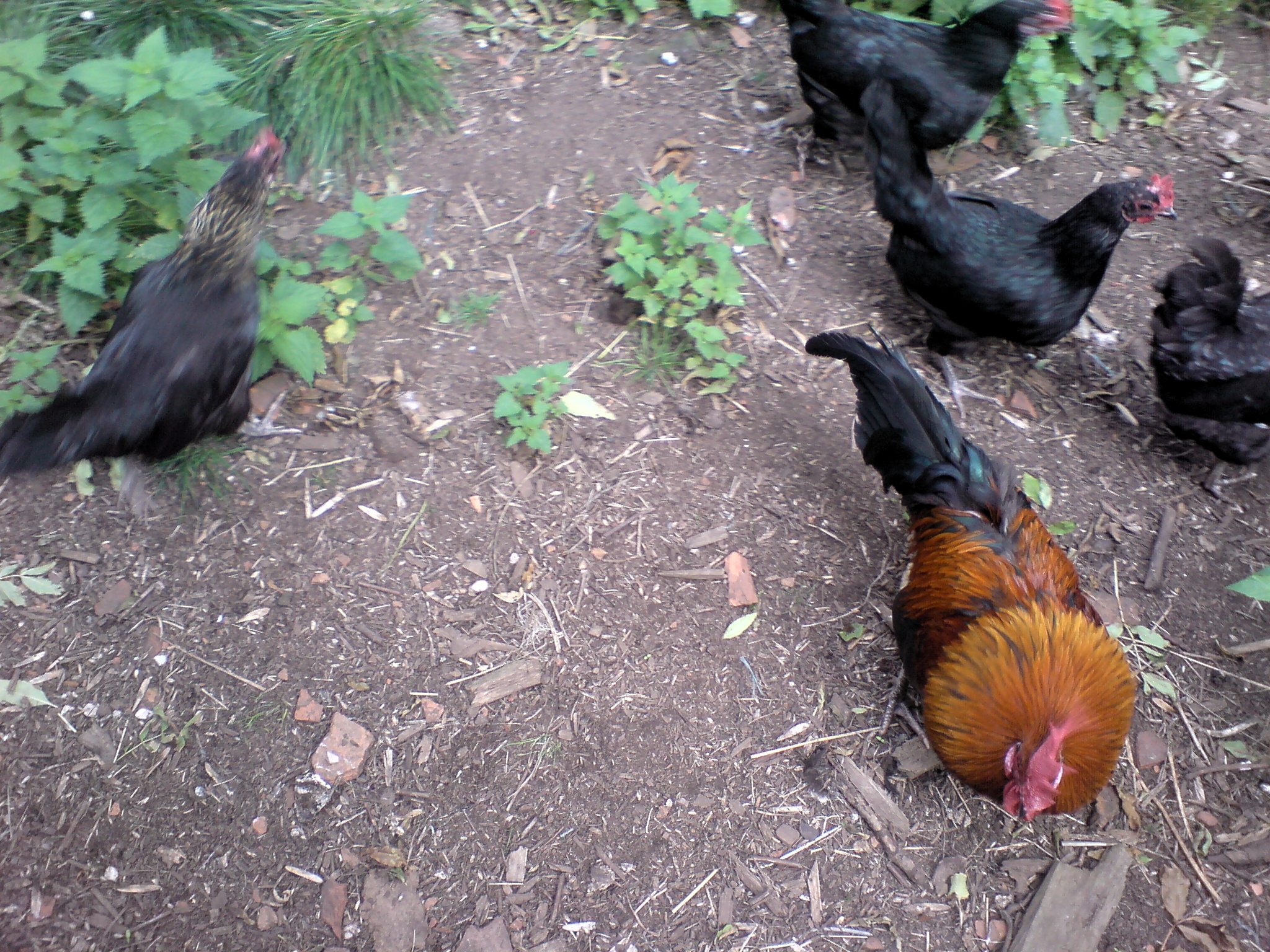 Åsbohöns ur en besättning i Svenshögen i Bohuslän.